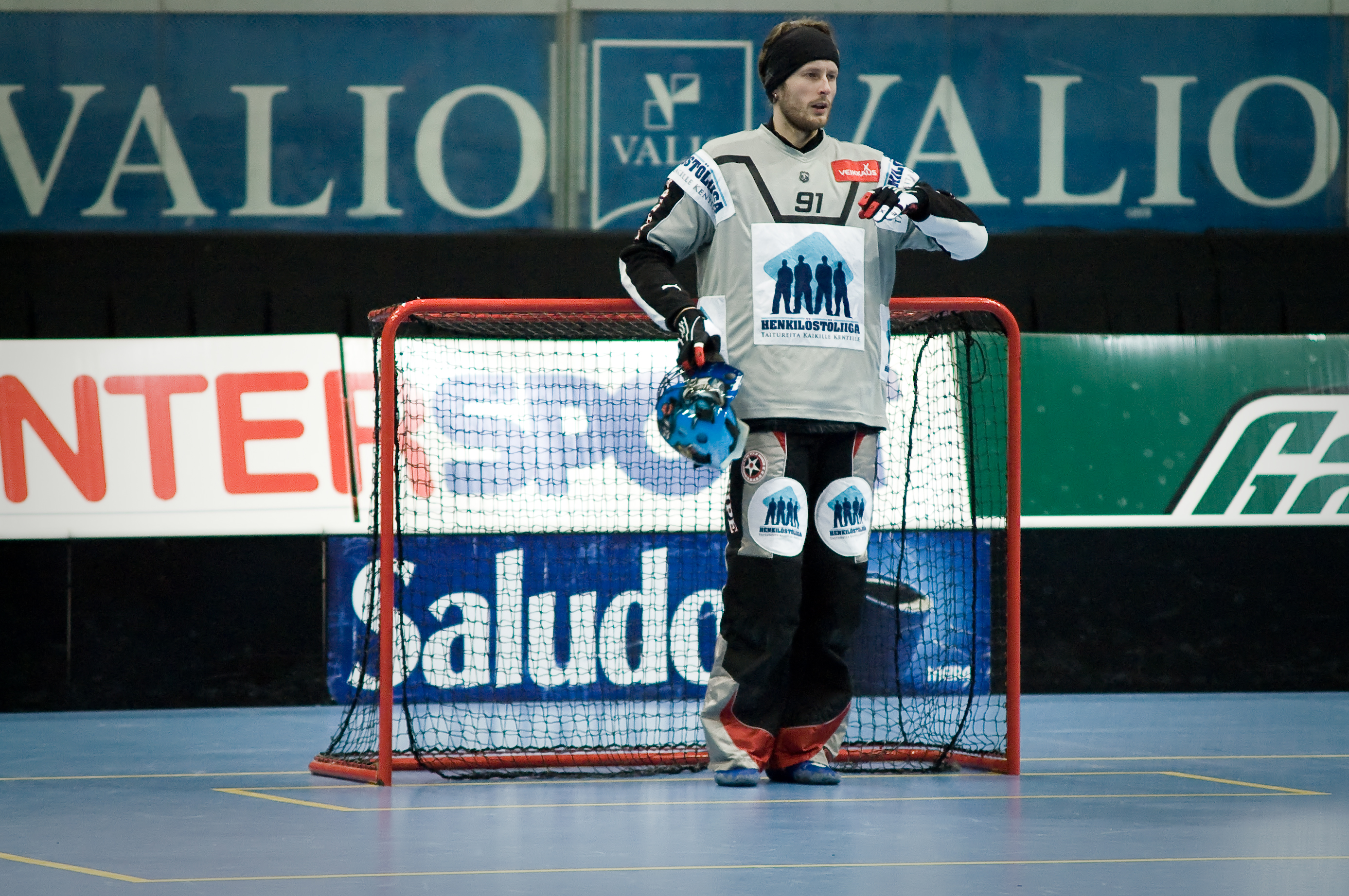 Markus Suntila, TPS, salibandy.